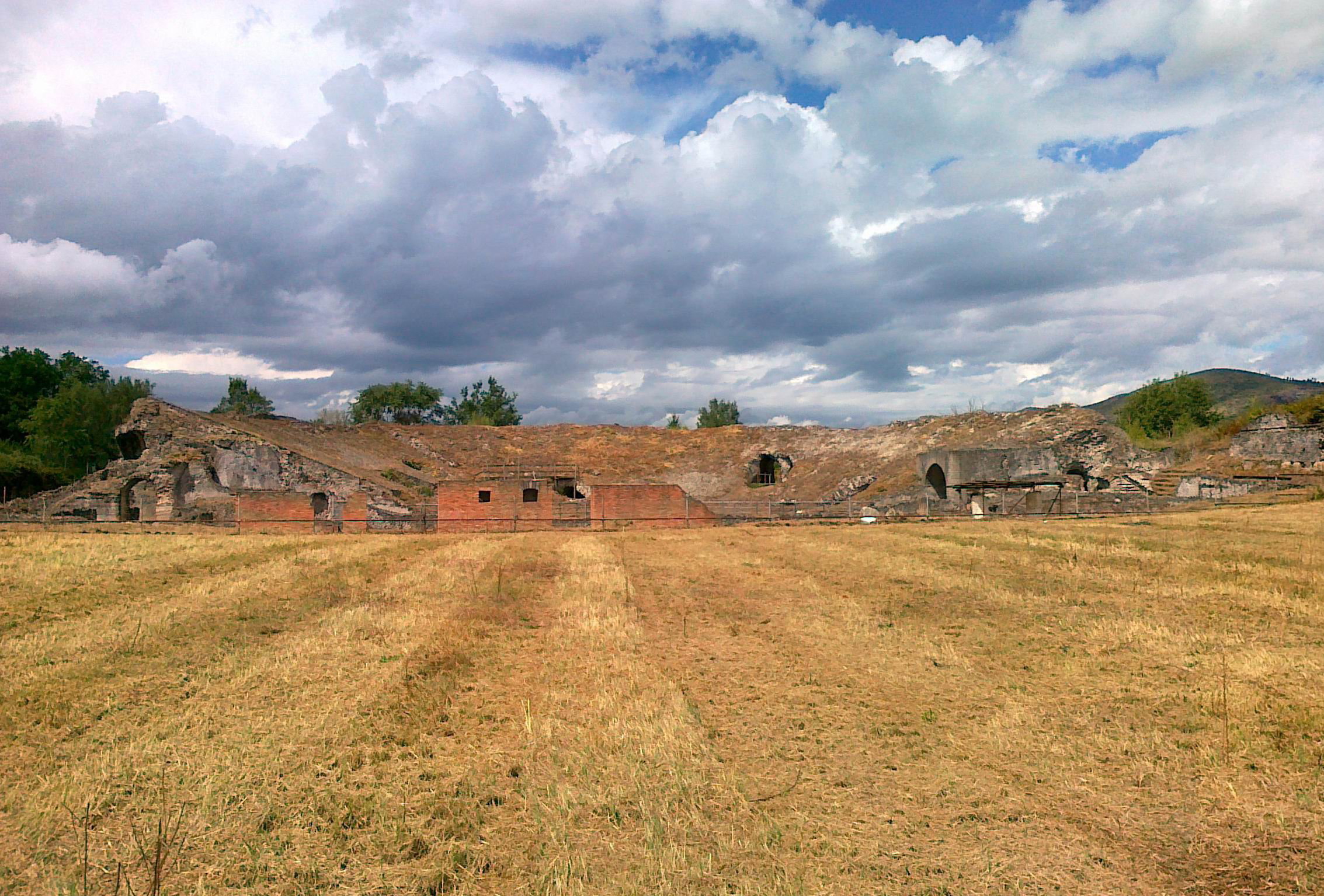 Incontri al Teatro -Cales 2012